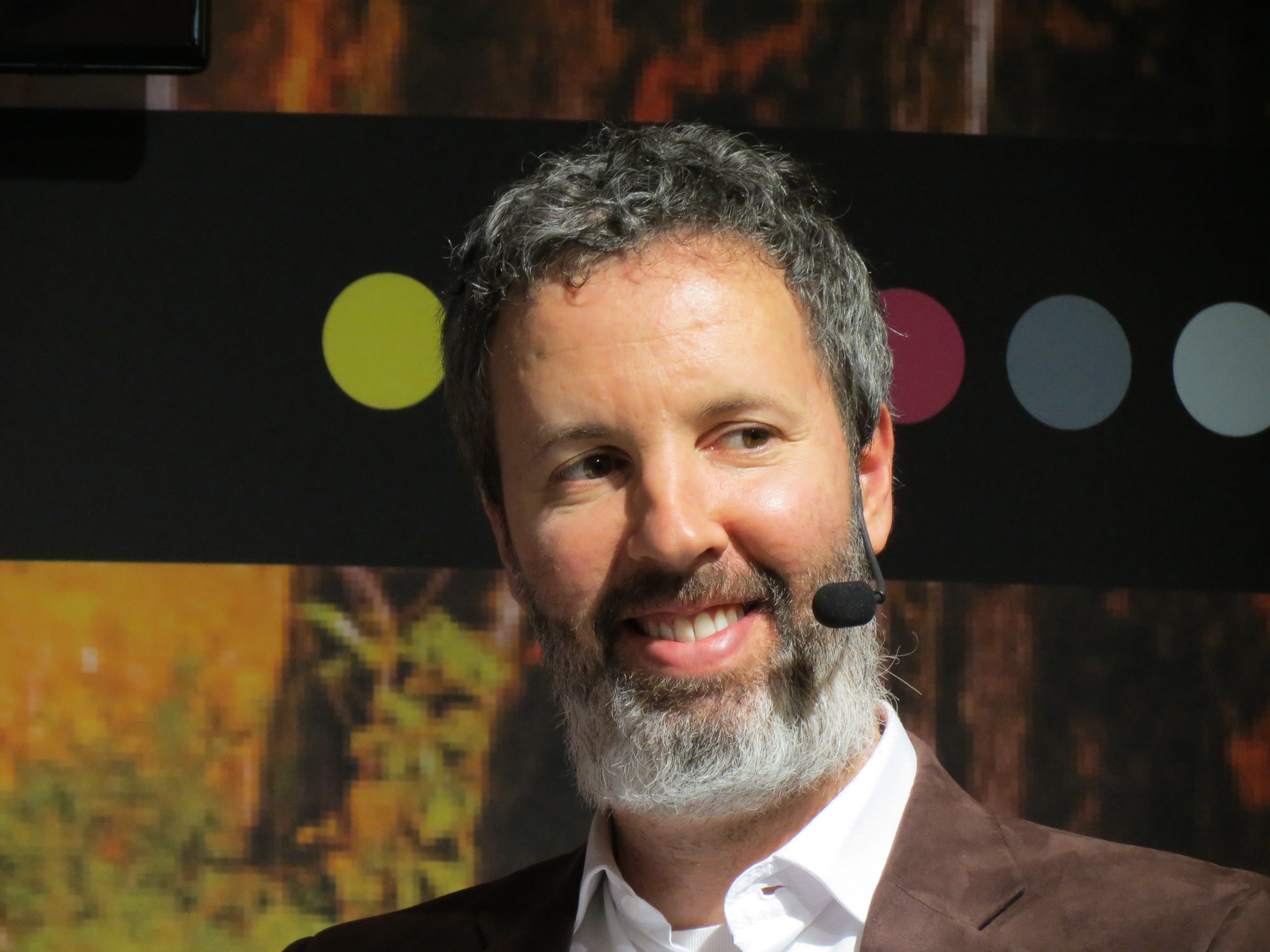 Michel Laub, brasiliansk författare och journalist.